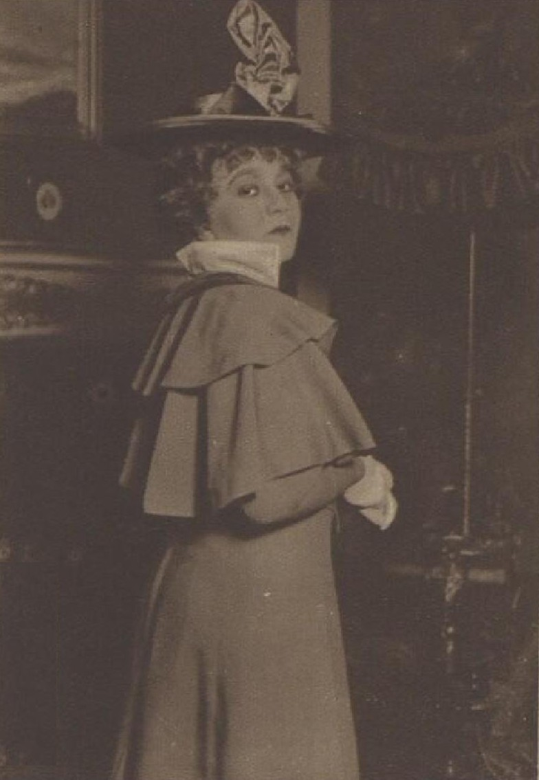 Eva Svobodová, česká herečka